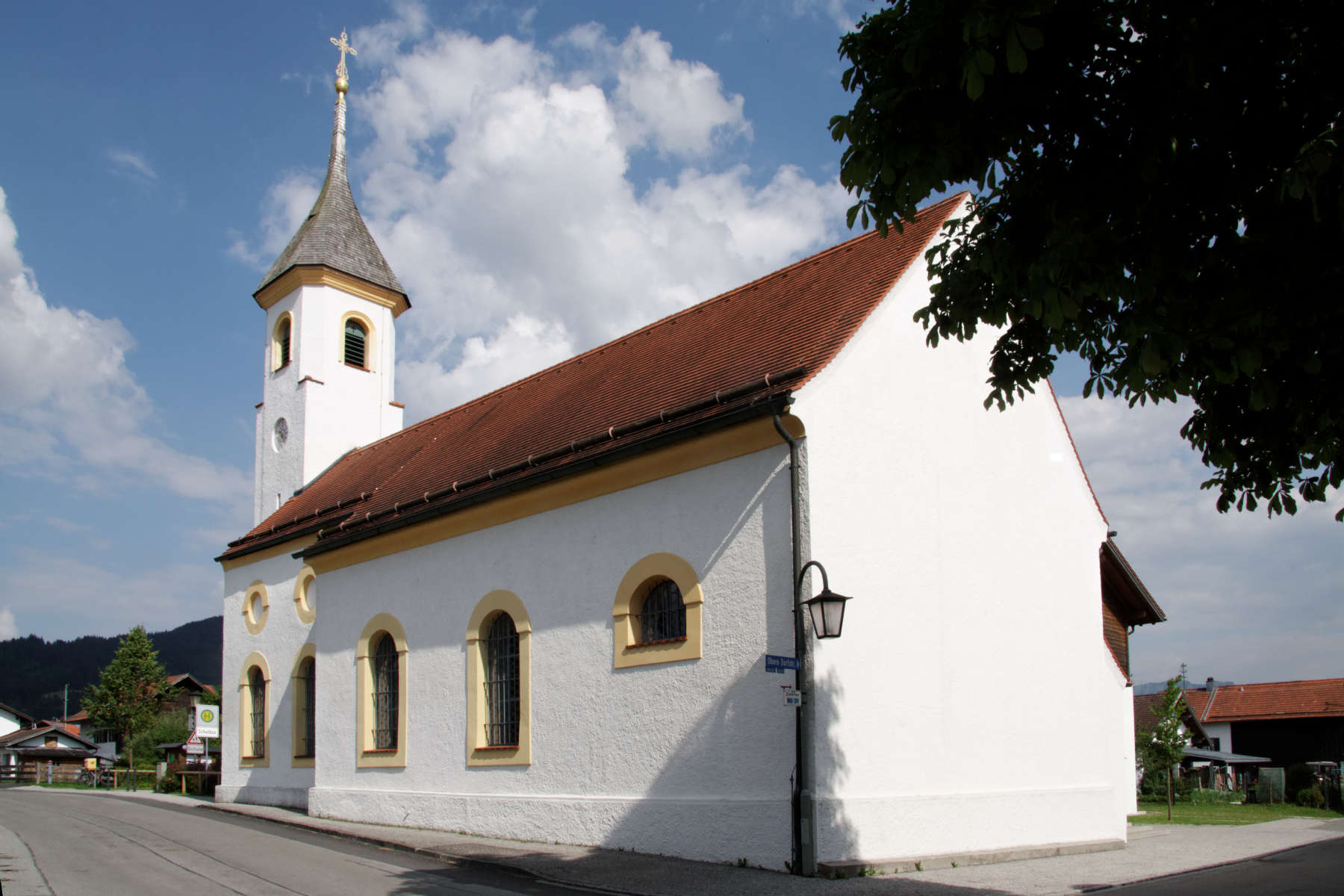 Saulgrub, Katholische Pfarrkirche St. Anton im Ortsteil Altenau